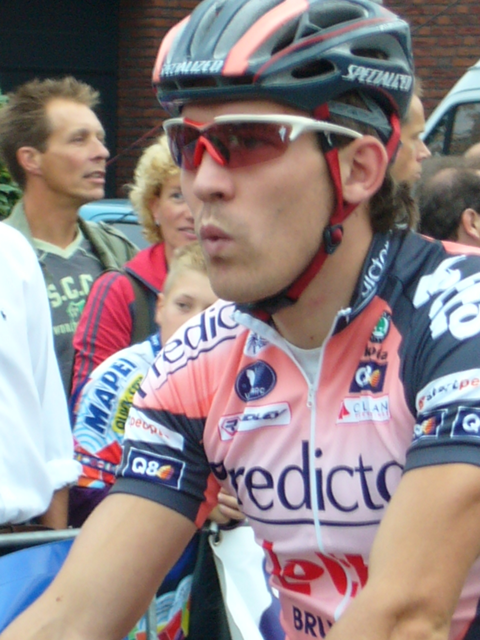 Wim de Vocht voor de start van de Mijl van Mares / Wim de Vocht before the start of the "Mijl van Mares"